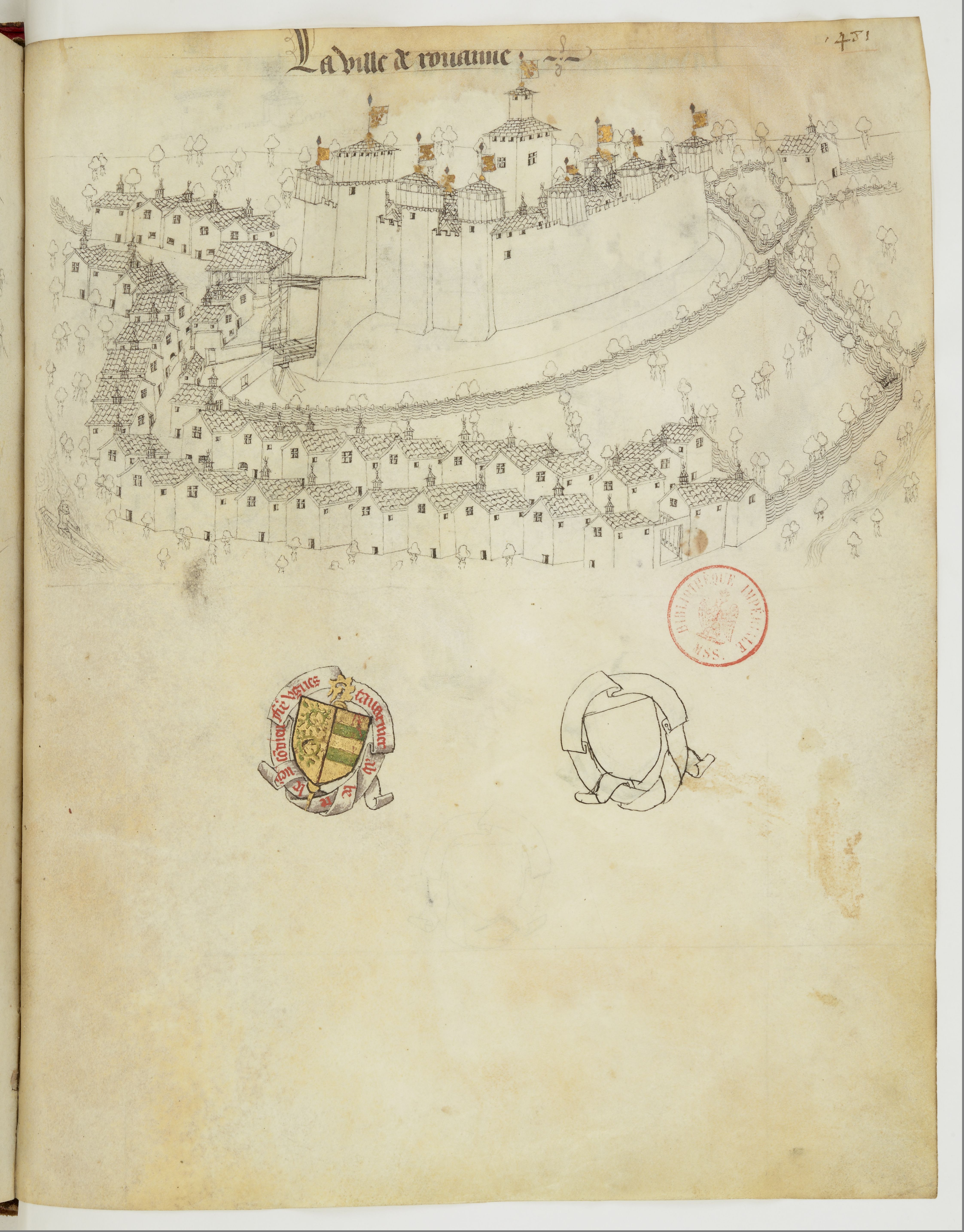 in Armorial d'Auvergne, pages présentant des chateaux, villes et blasons.